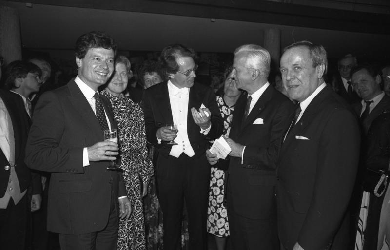 3.6.1987 Der Präsident des Bundesrates, der hessische Ministerpräsident Dr. Wallmann, und der Oberbürgermeister der Stadt Bonn, Dr. Hans Daniels, laden ein zu einem Konzert mit anschließendem Empfang in der Bonner Beethovenhall.